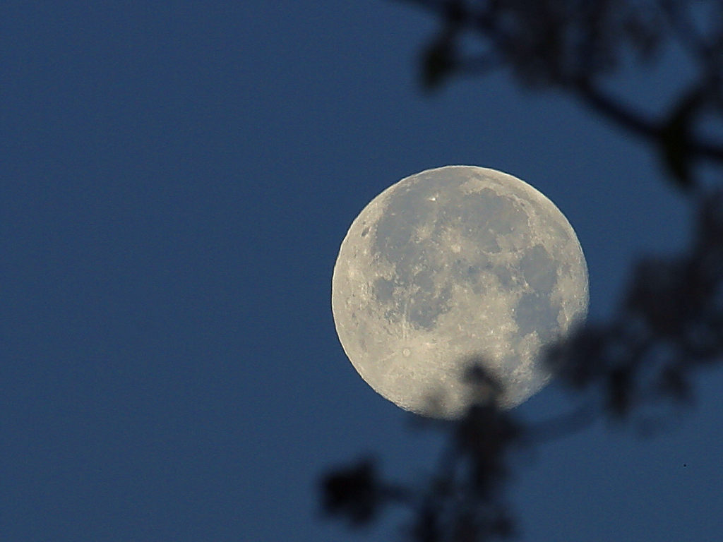 Moon